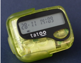 Récepteur TATOO de marque ALPHAPAGE